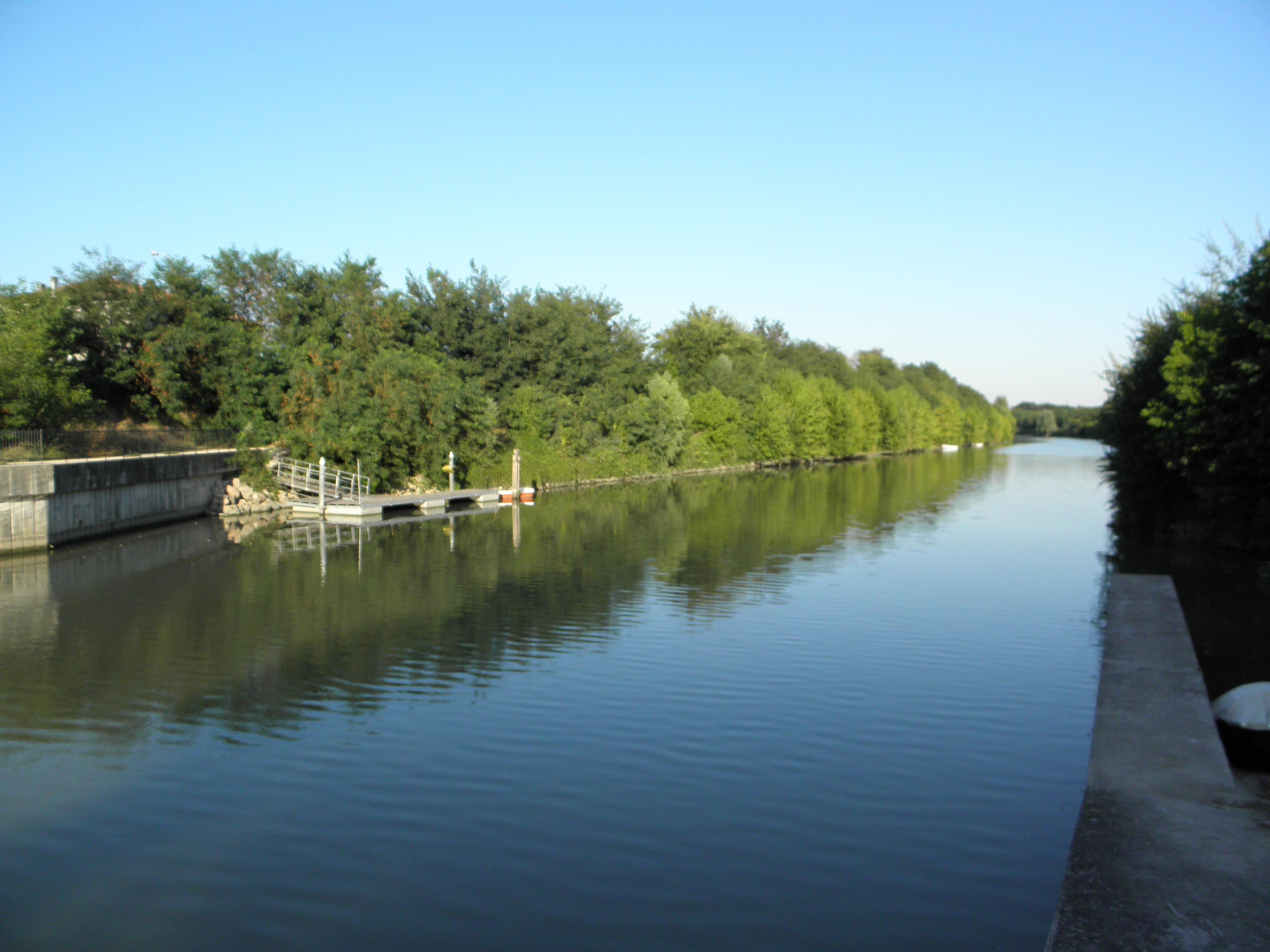 Il Canalbianco presso Casteguglielmo.